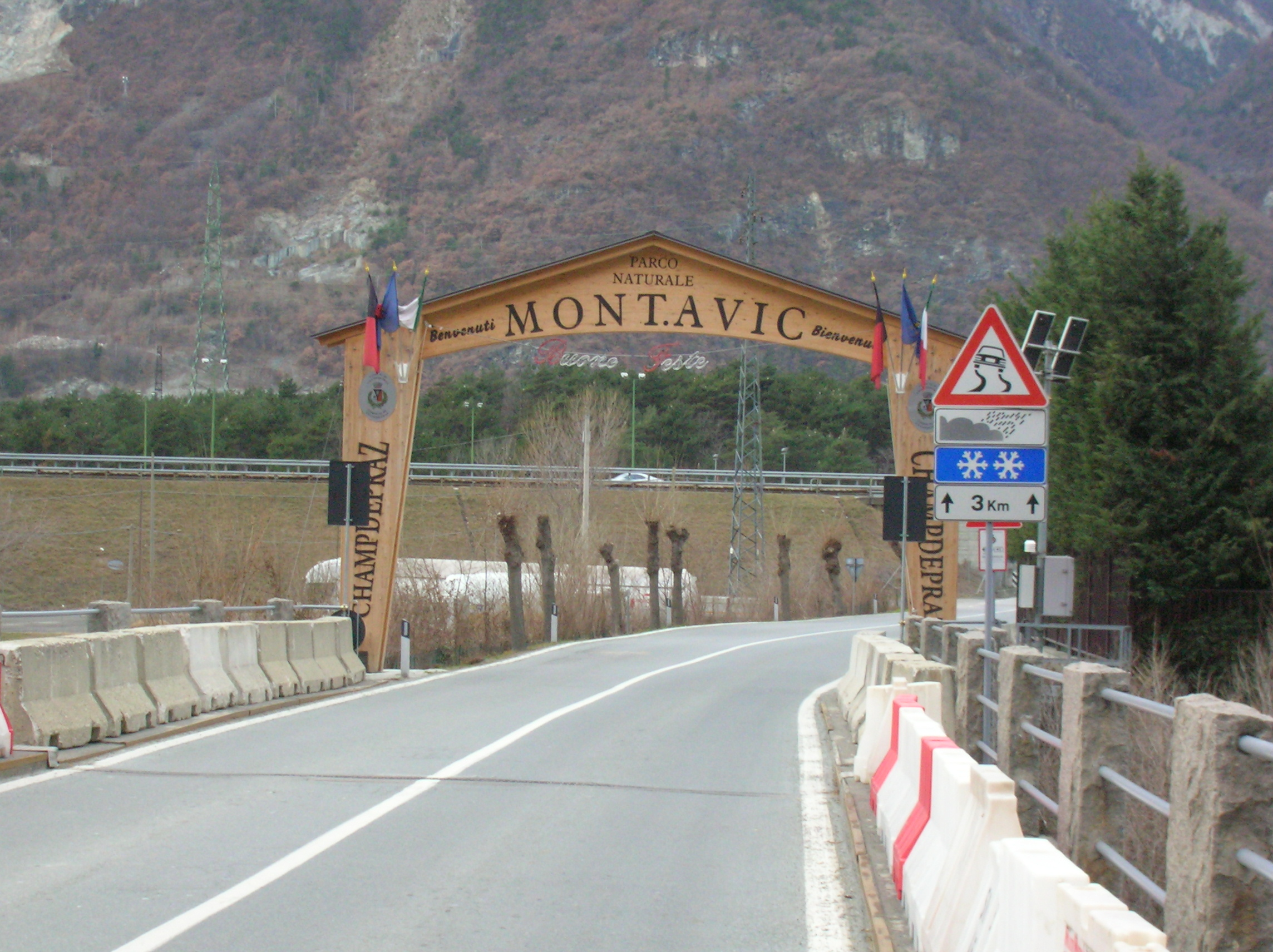 Arco d'ingresso nel territorio del Parco naturale del Mont Avic. Champdepraz, Valle d'Aosta, Italia.